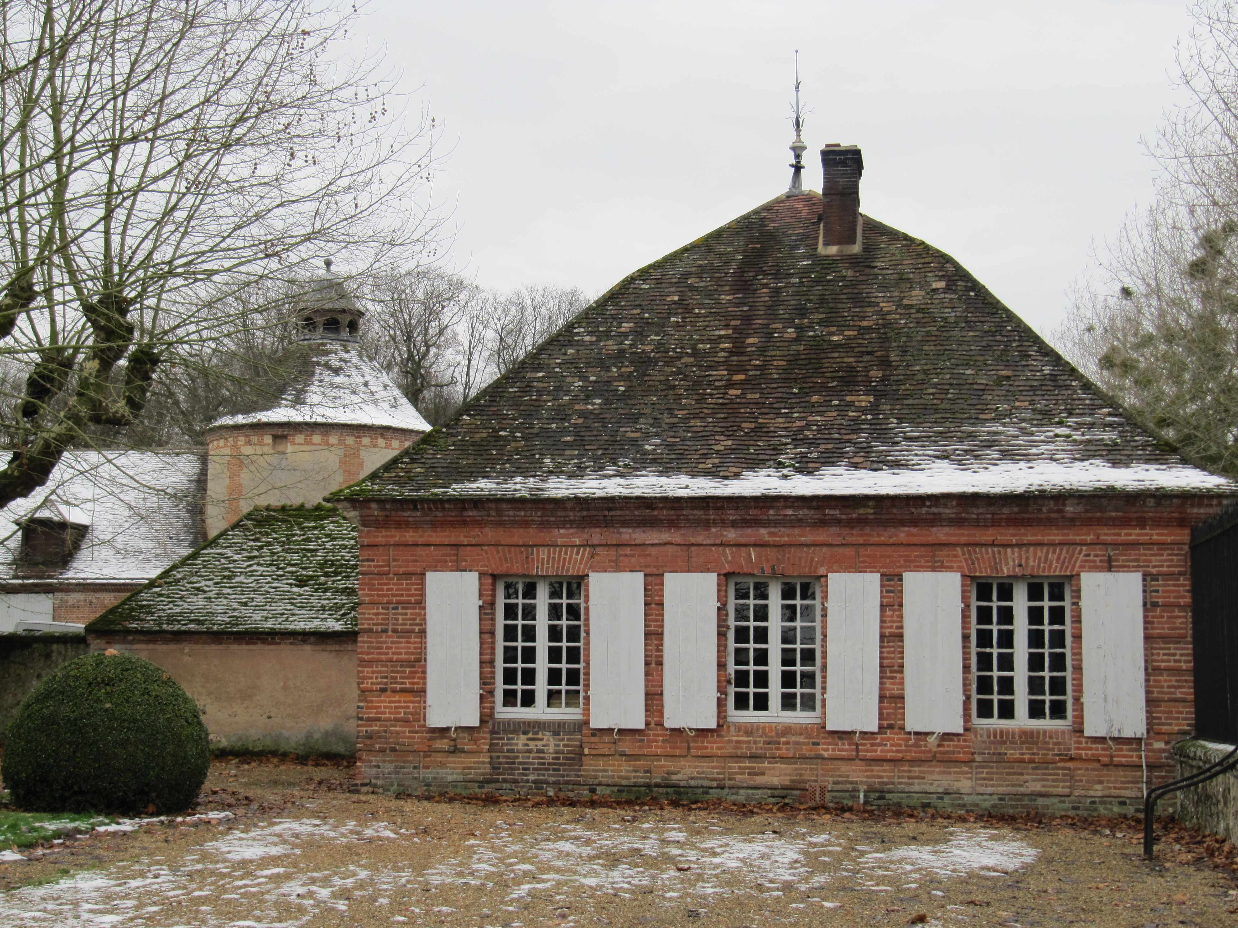 Pavillon coiffé d'une toiture pyramidale.